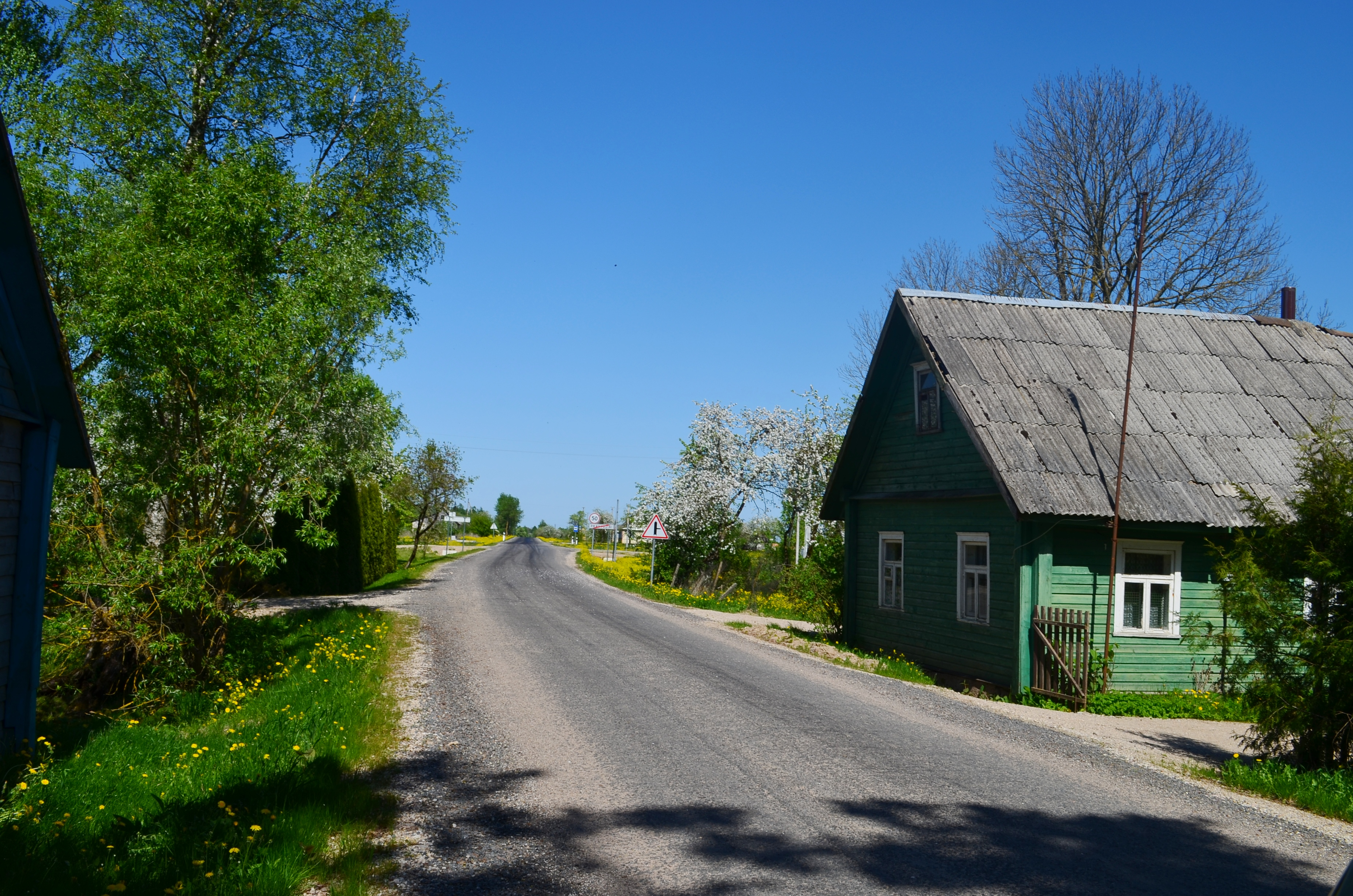 Pravydžiai, Kavarsko sen., Anykščių raj.